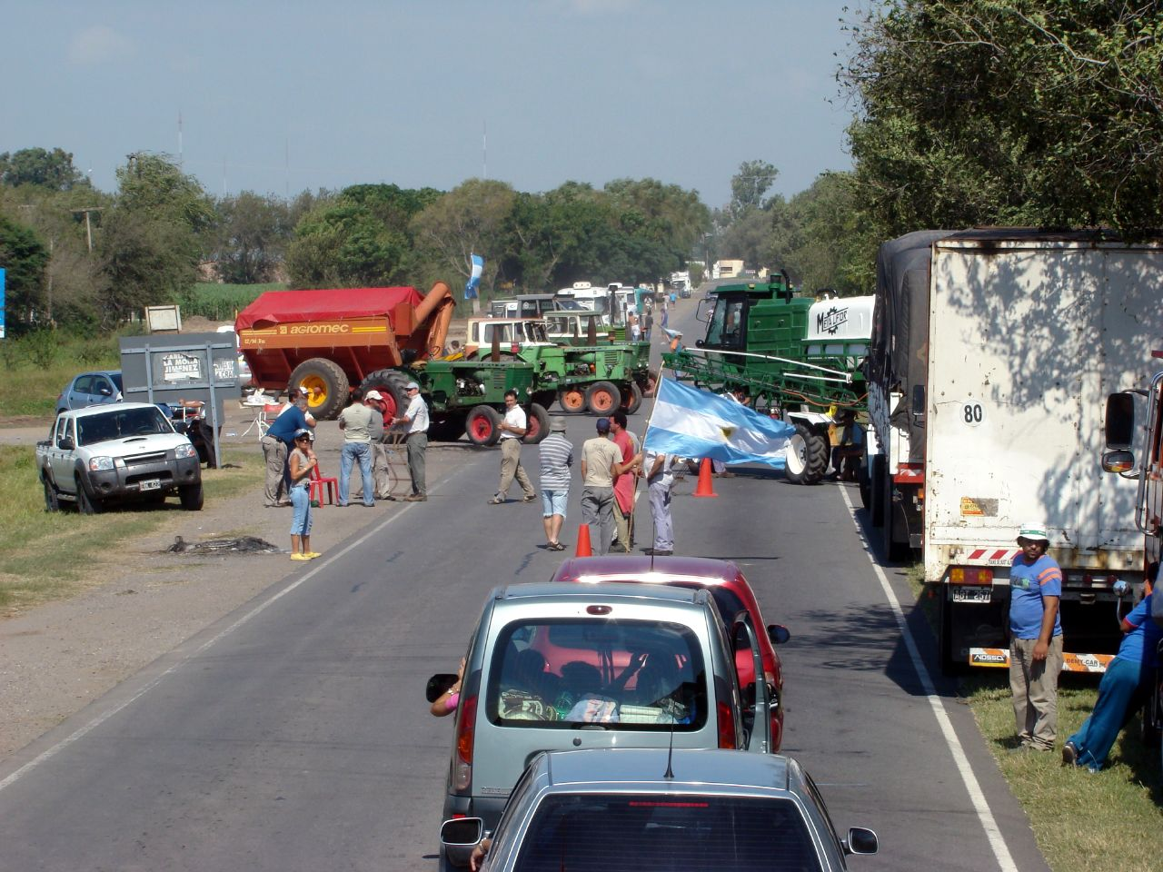 Corte de ruta de los productores agropecuarios sobre la Ruta Nacional 9, en jurisdicción de Oliva, provincia de Córdoba (cerca de Villa María). Road blockade by agricultural producers on National Route 9, near Oliva, Córdoba Province, Argentina (see: Argentina farmbelt rebellion , D for Disorientation: I'm with the farmers )